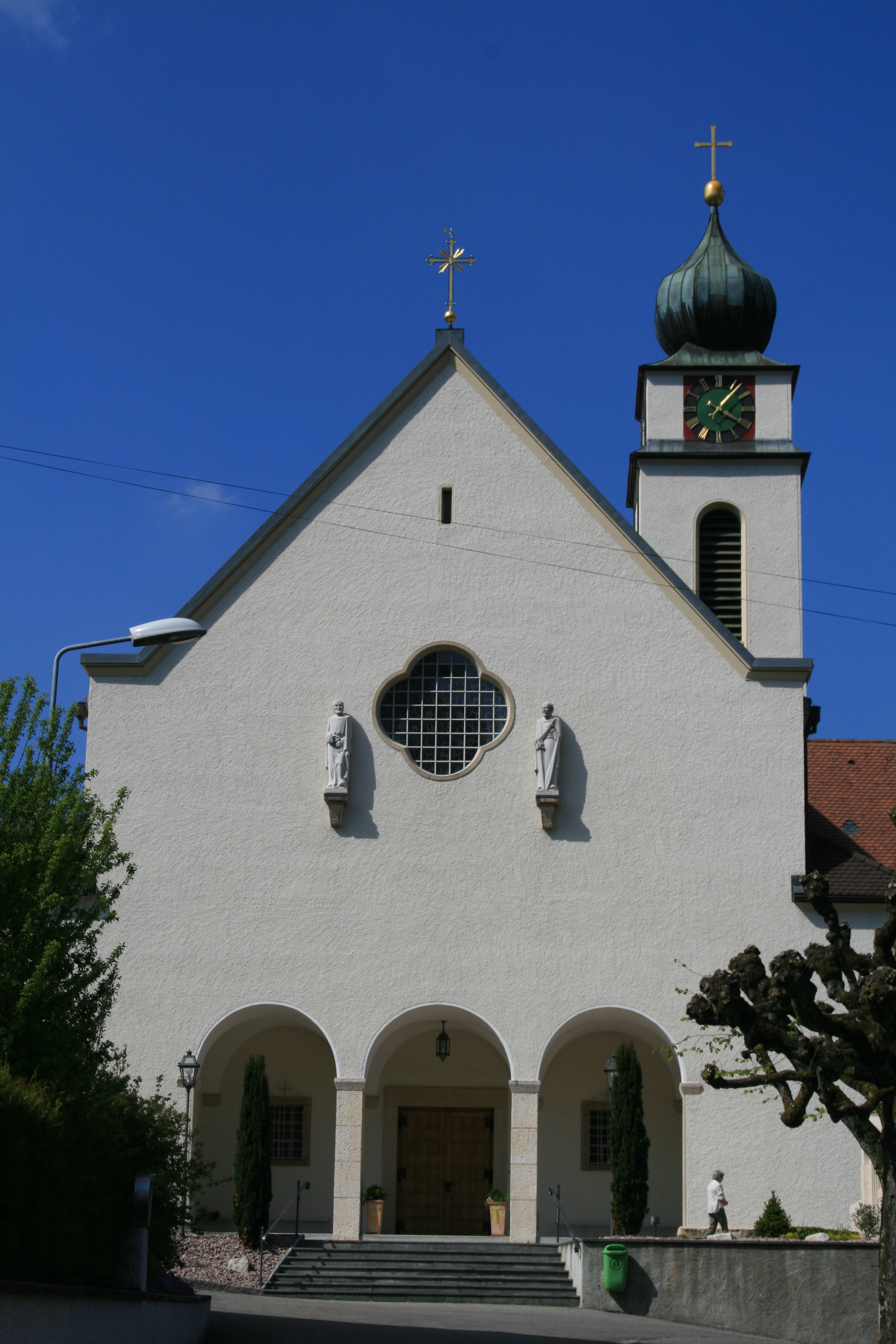 St. Martins-Kirche in Mümliswil SO, Schweiz